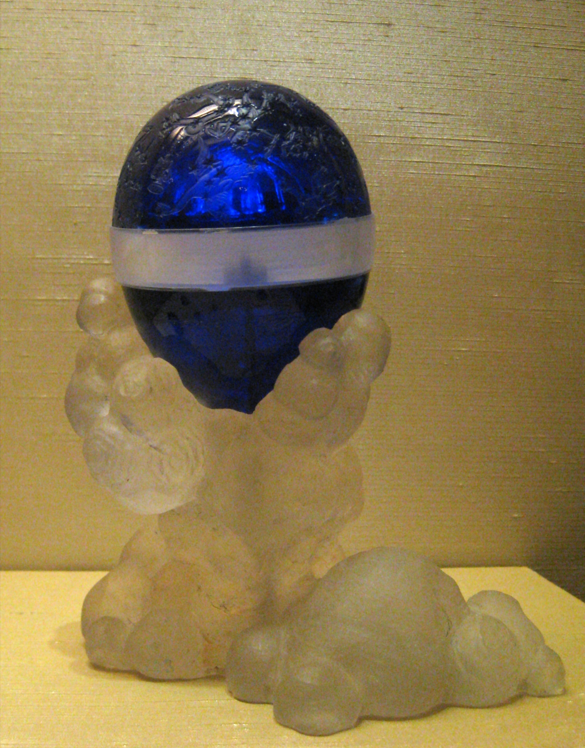 Яйцо Фаберже "Созвездие" (незаконченное). Музей Ферсмана